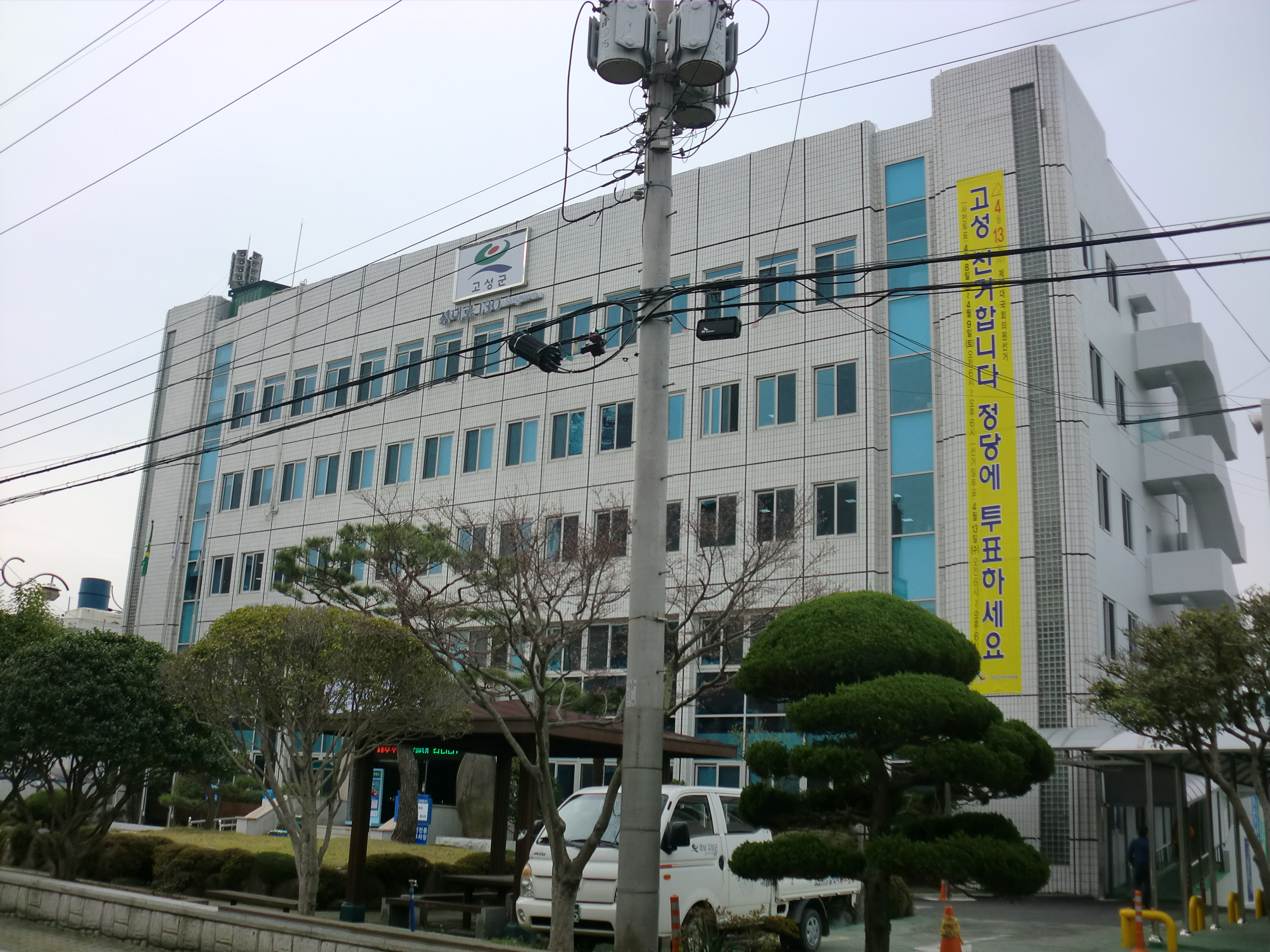 경상남도 고성군에 있는 고성군청